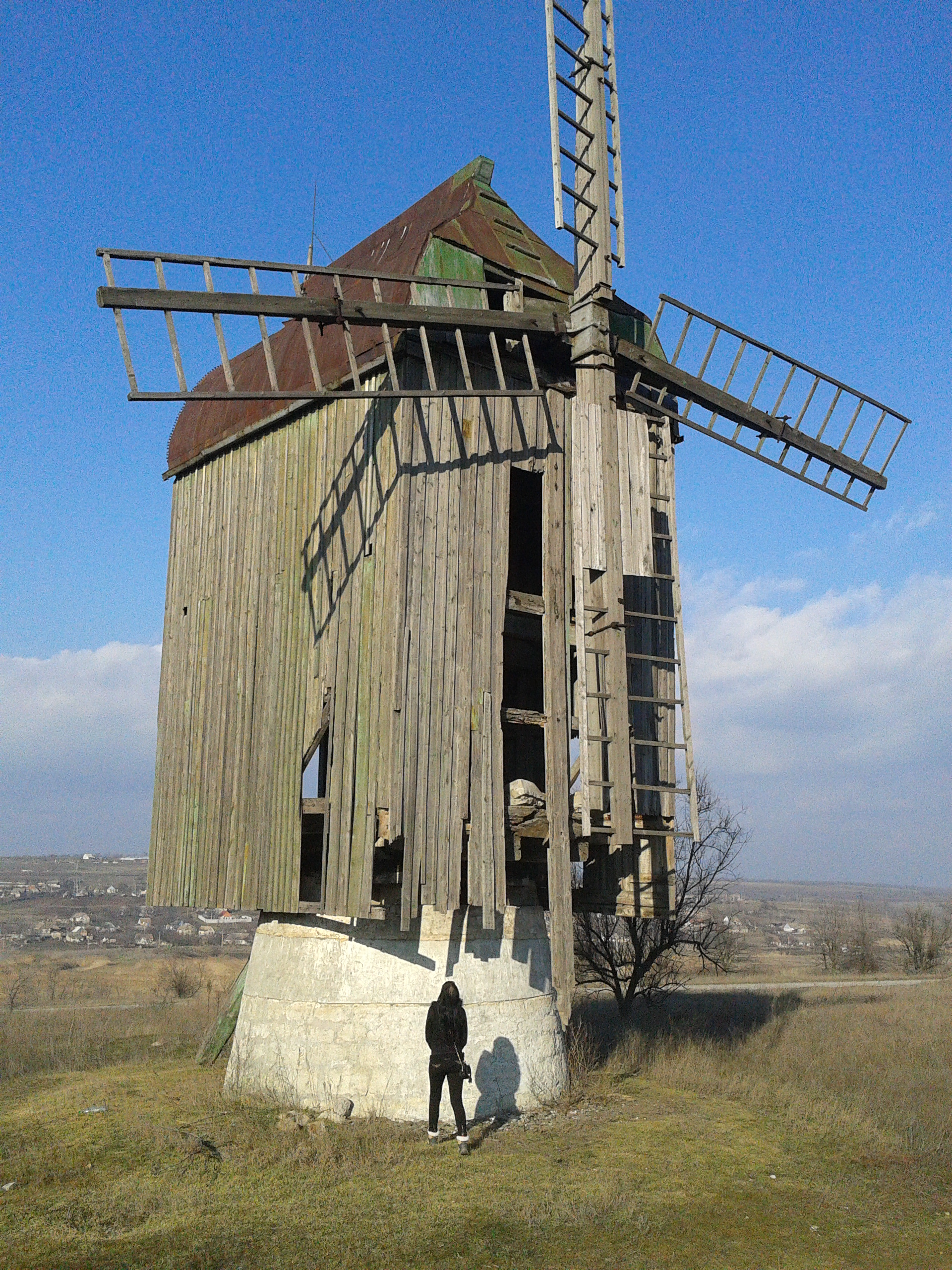 Вітряк, С. Кам'янське, на південній околиці села